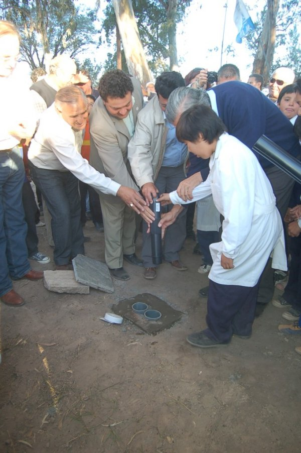 Colocación Piedra Basal, autoridades: Sr. Ing. Gobernador Don José Luis Gioja, Intendente de Ullúm Don Alfredo Simón Ortiz, Diputado departamental Sr. Don Jorge Agapito Gil, junto a un alumno del establecimiento y vecinos, año 2011